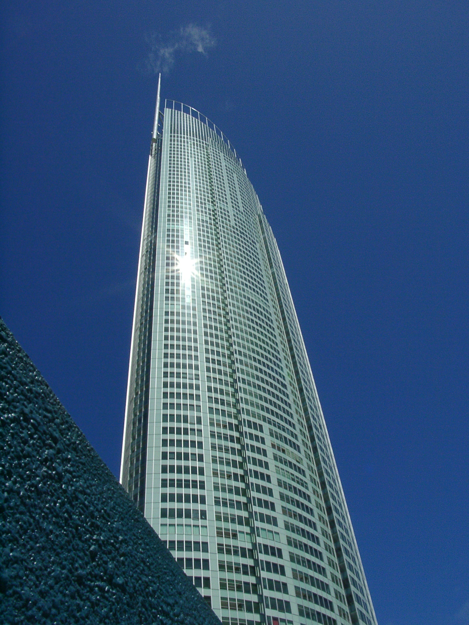 Der Q1 Tower an der Gold Coast (Australien)